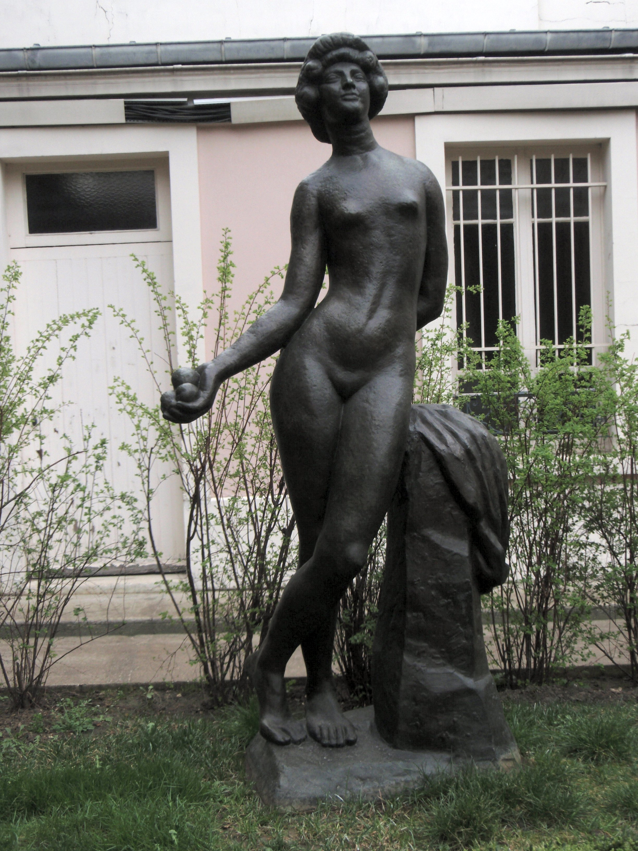 Antoine Bourdelle (Français, 1861-1929): Le Fruit, 1911, bronze, jardin du Musée Antoine Bourdelle à Paris (XVe arrondissement). Au fond atelier de l'artiste.